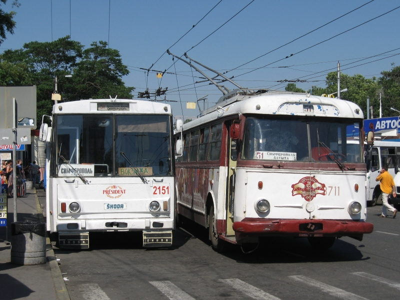 Trolejbusy meziměstských linek před nádražím v Simferopolu